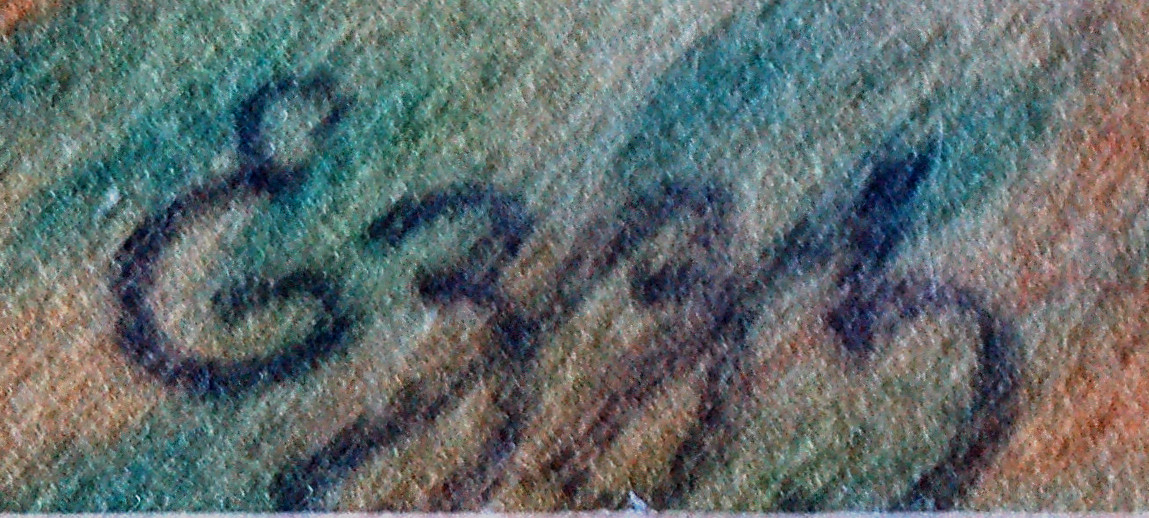 FSignatur av konstnären Felix Ezzi född i Karlstad 1896.